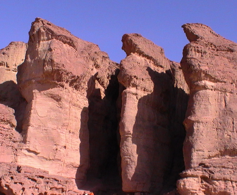 Долина Тимна. Столбы Соломона